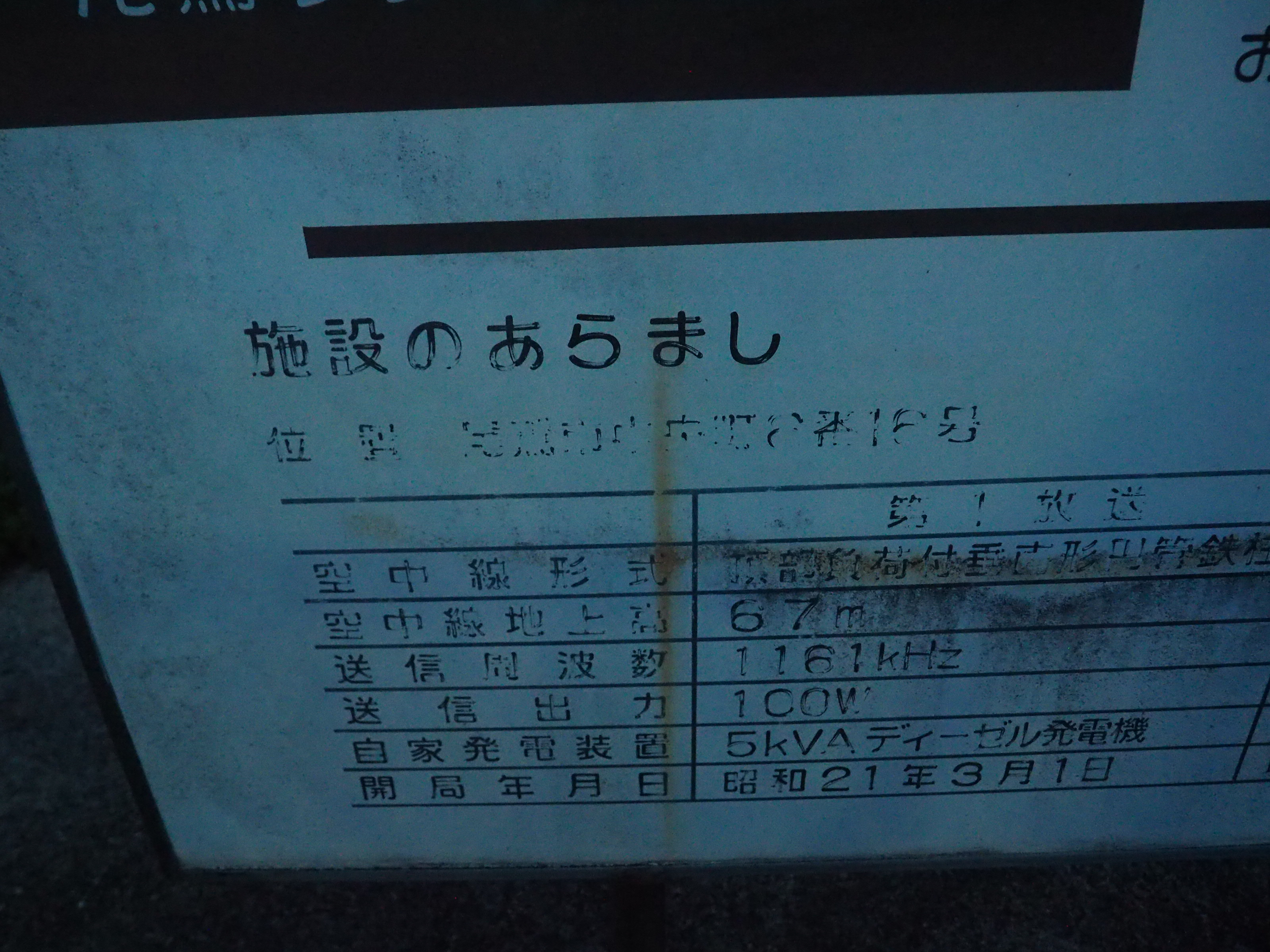 NHK 尾鷲ラジオ中継放送所の銘鈑